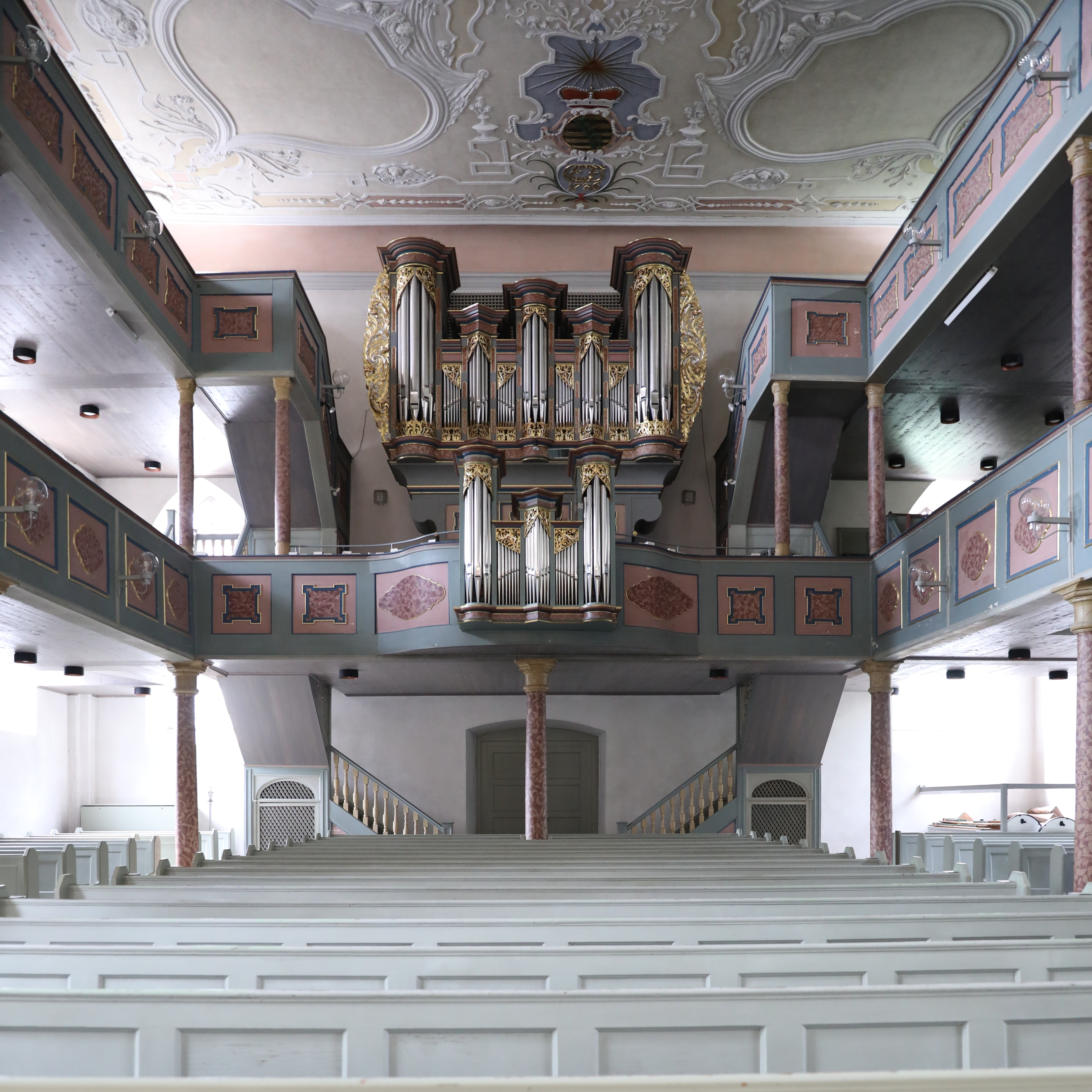 Ev. Heiligkreuzkirche, Coburg